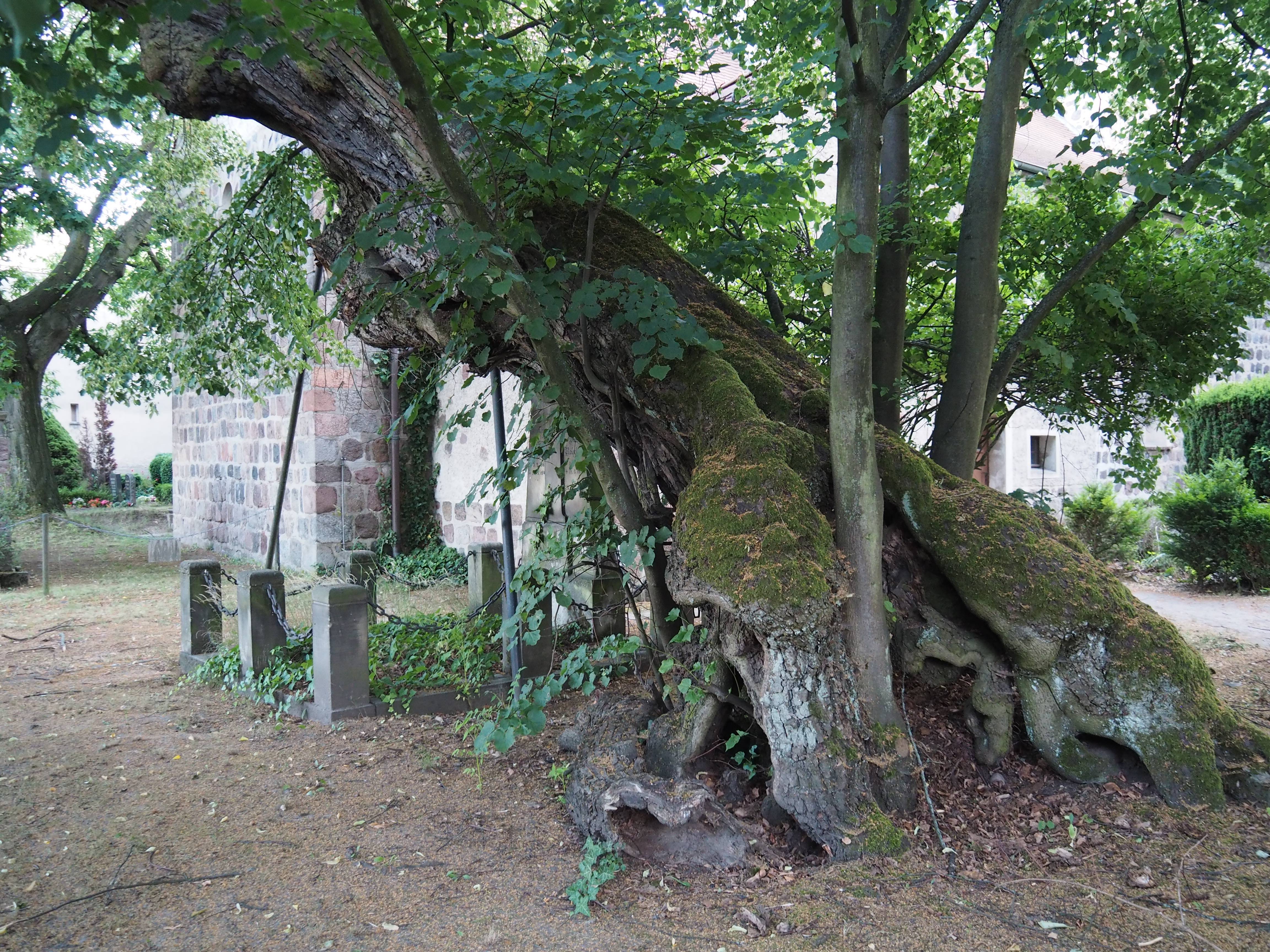 Mahlsdorfer Linde in Berlin-Mahlsdorf vor der Alten Pfarrkirche Mahlsdorf